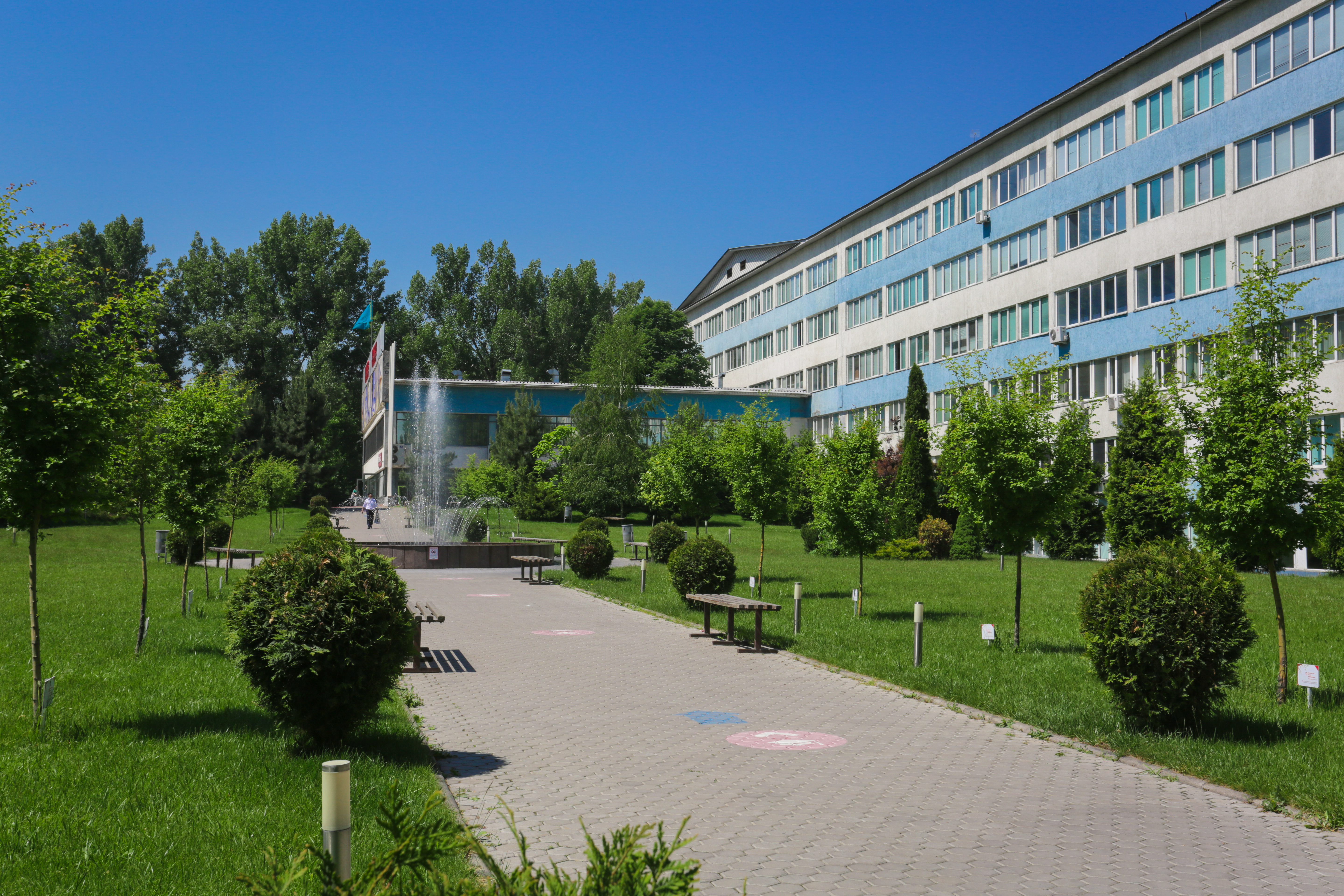 Университет Нархоз